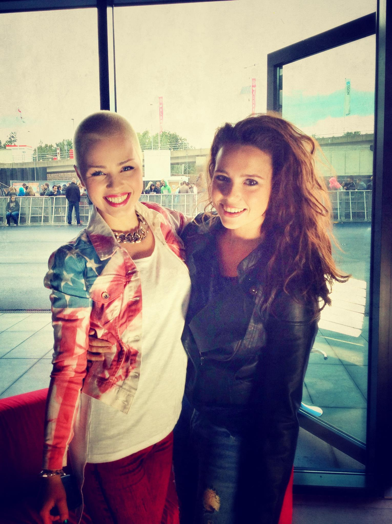 Xite VJ's Gwen van Poorten en Celine Bernaerts